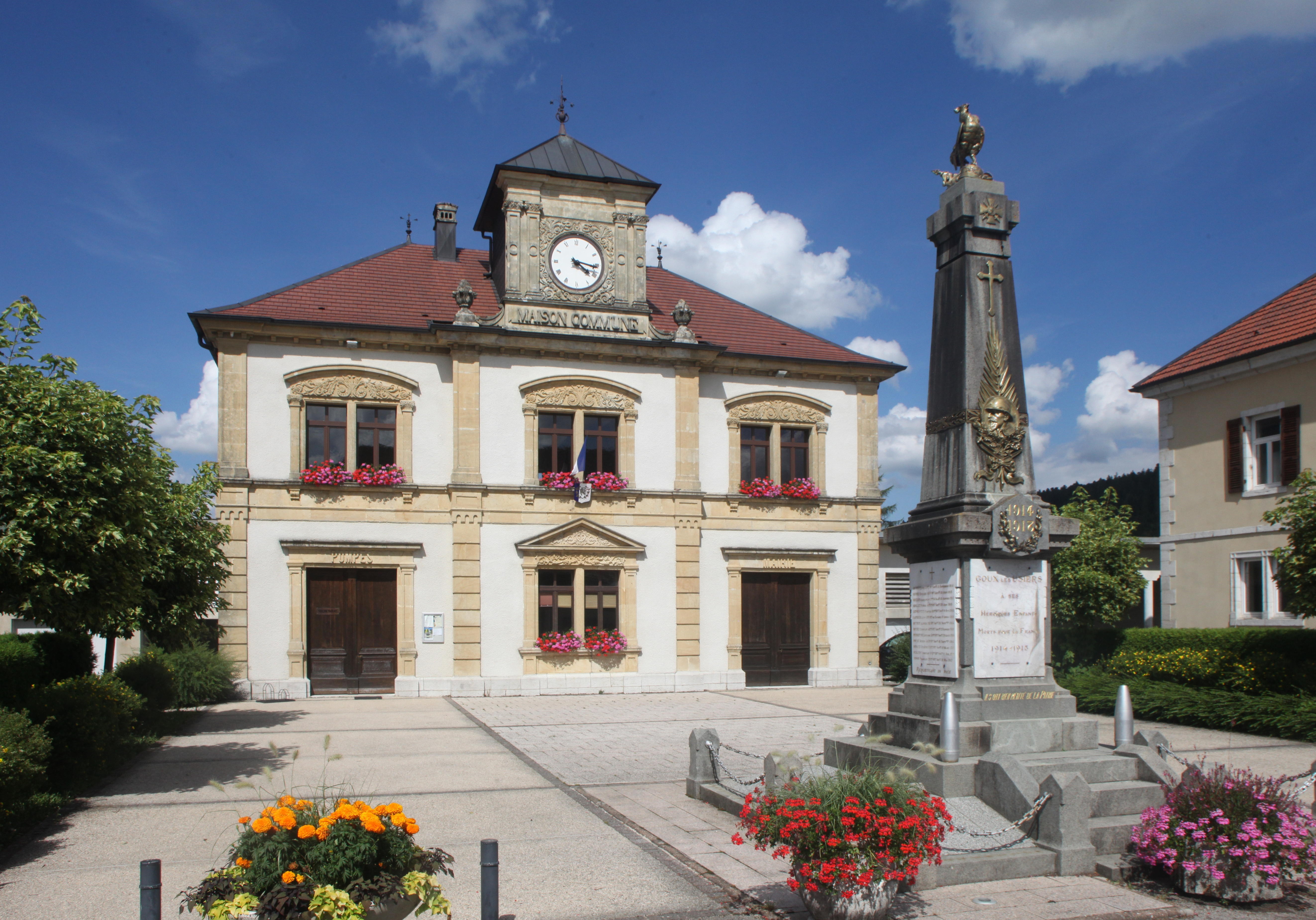 Mairie-école de Goux-les-Usiers (Doubs).